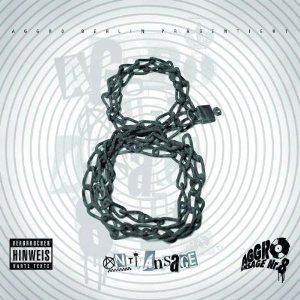 Cover des Samplers „Aggro Anti Ansage Nr. 8“